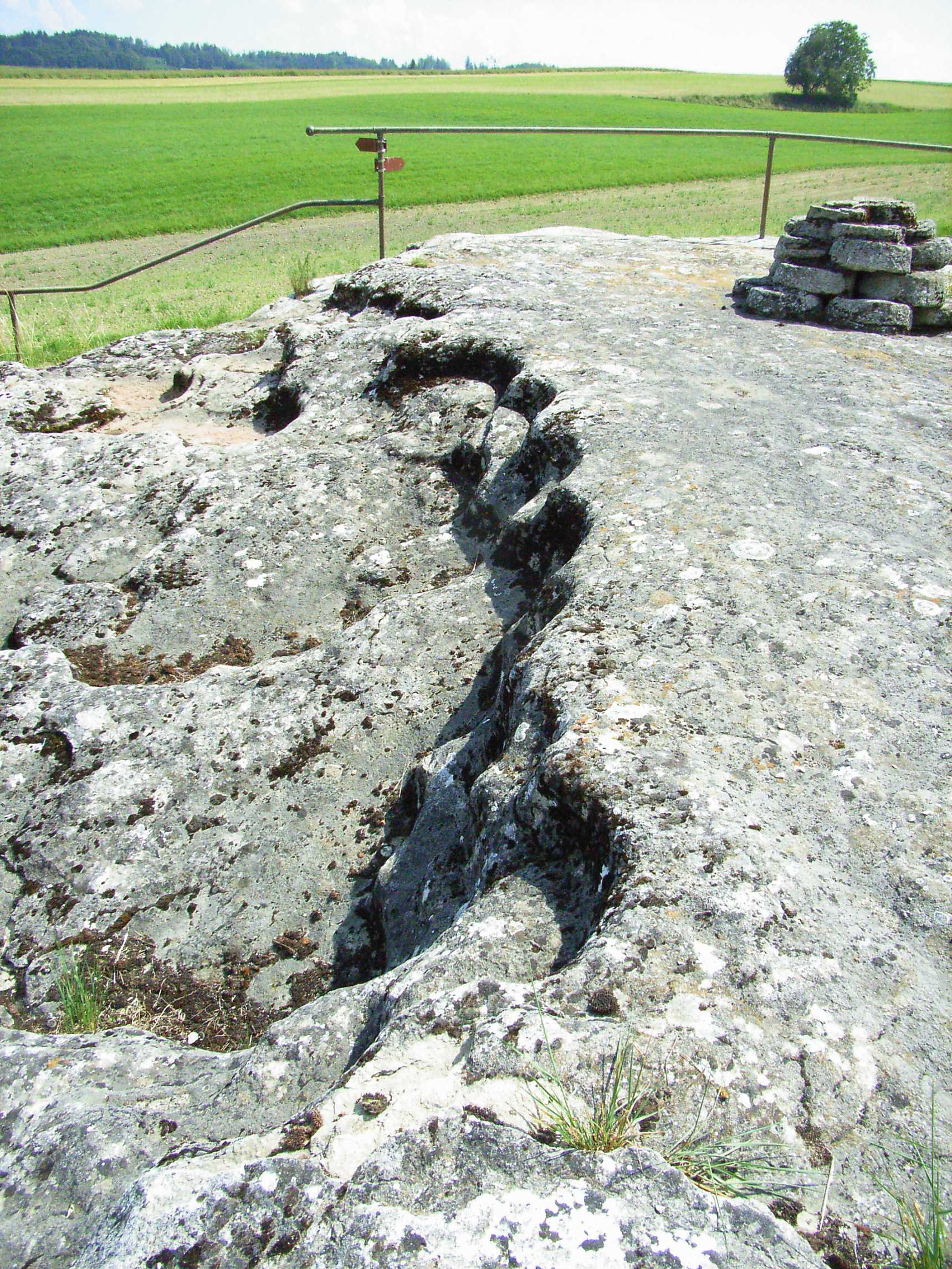 gallo-römischer Steinbruch in Chavannes-le-Chêne / VD